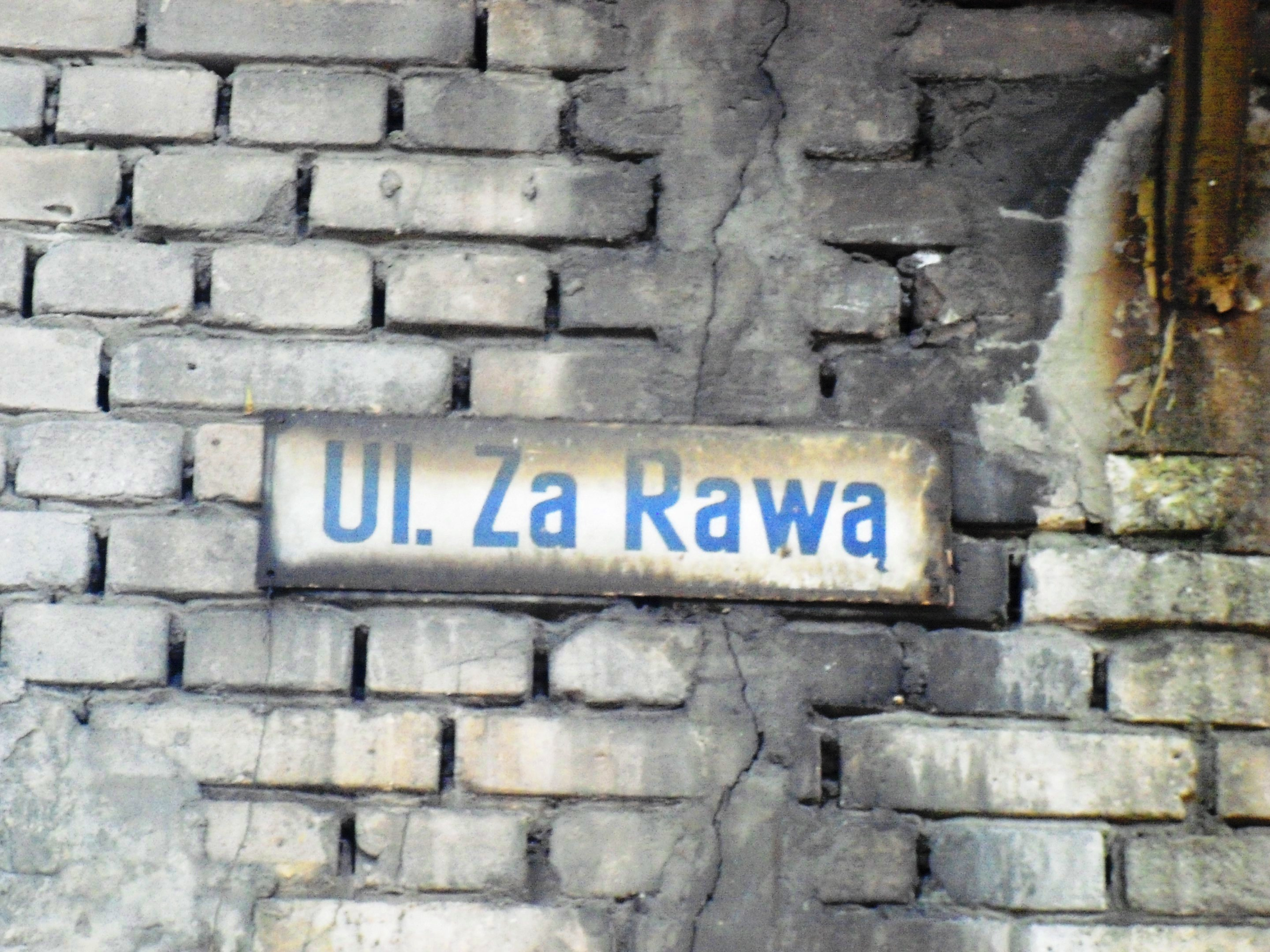 Huta Baildon w Katowicach - jedna z zakładowych uliczek - "Ul. Za Rawą"